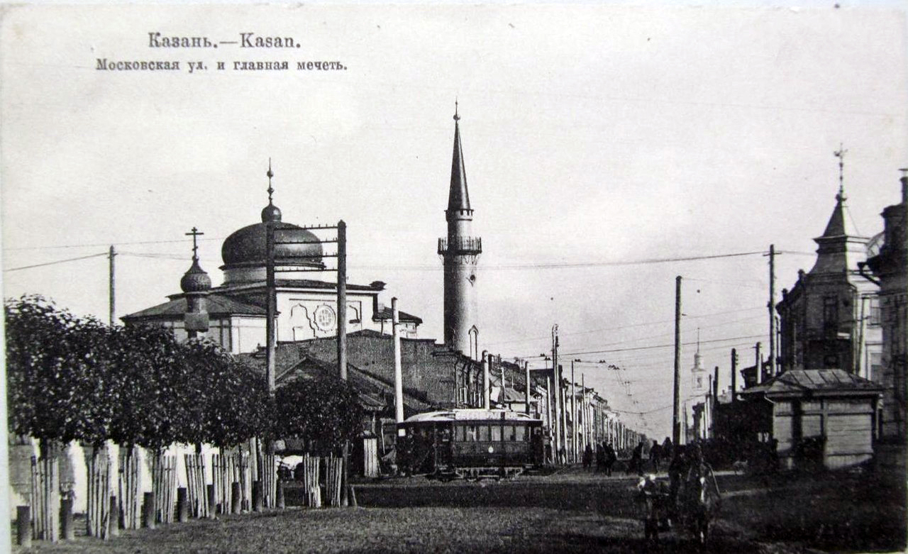 Московская улица и главная мечеть (Казань, нач. XX)